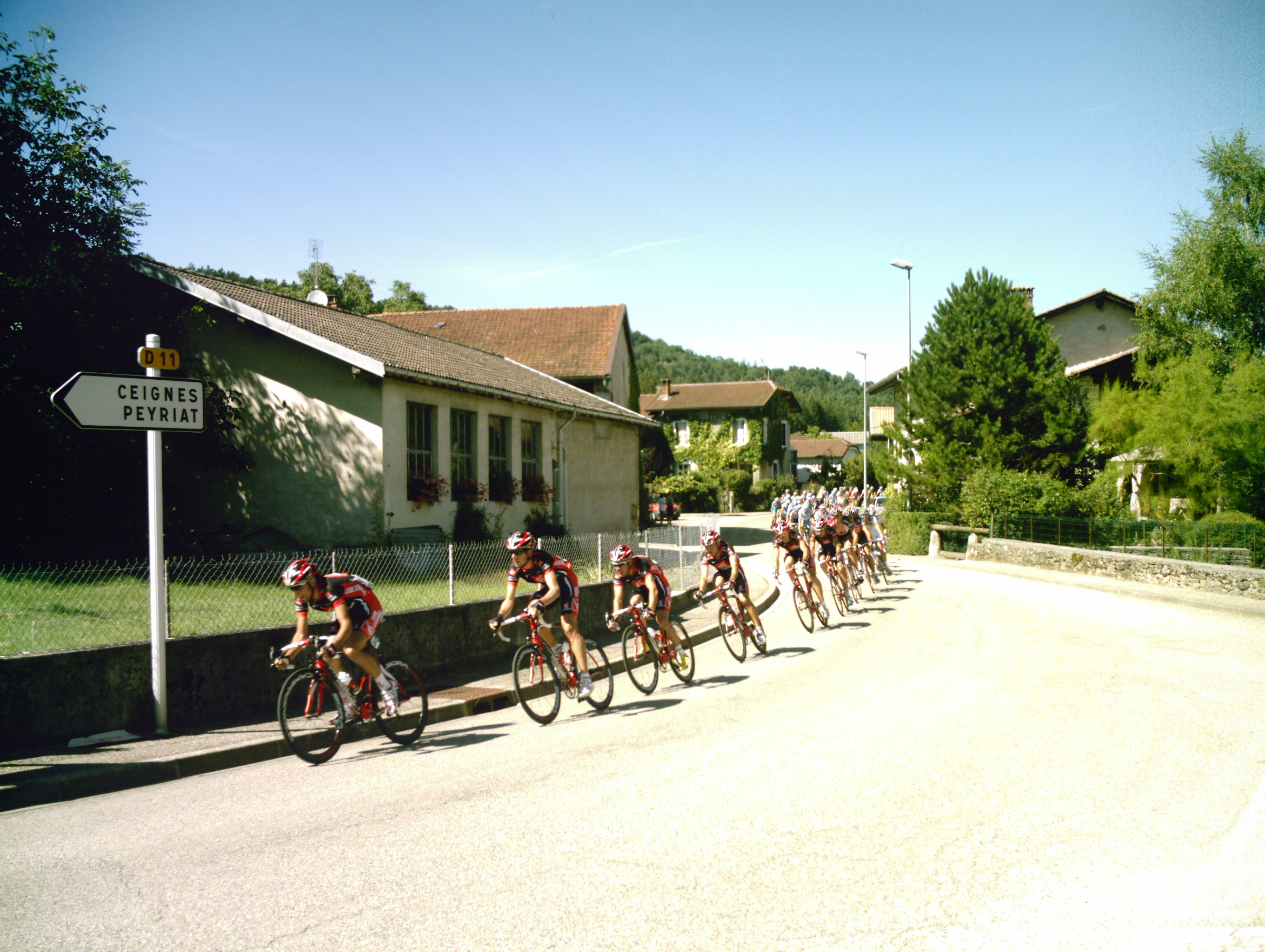 Passage du peloton du tour de l'Ain 2008 à Nurieux-Volognat lors de la première étape.